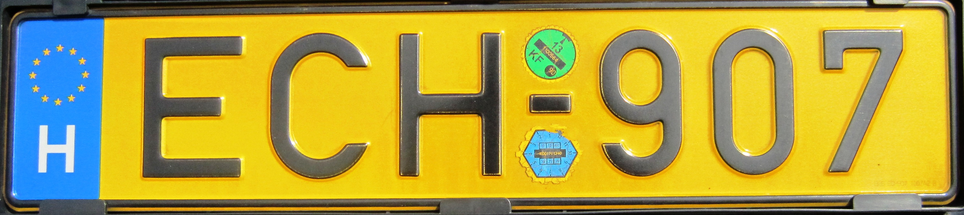 Hungary yellow plate EU